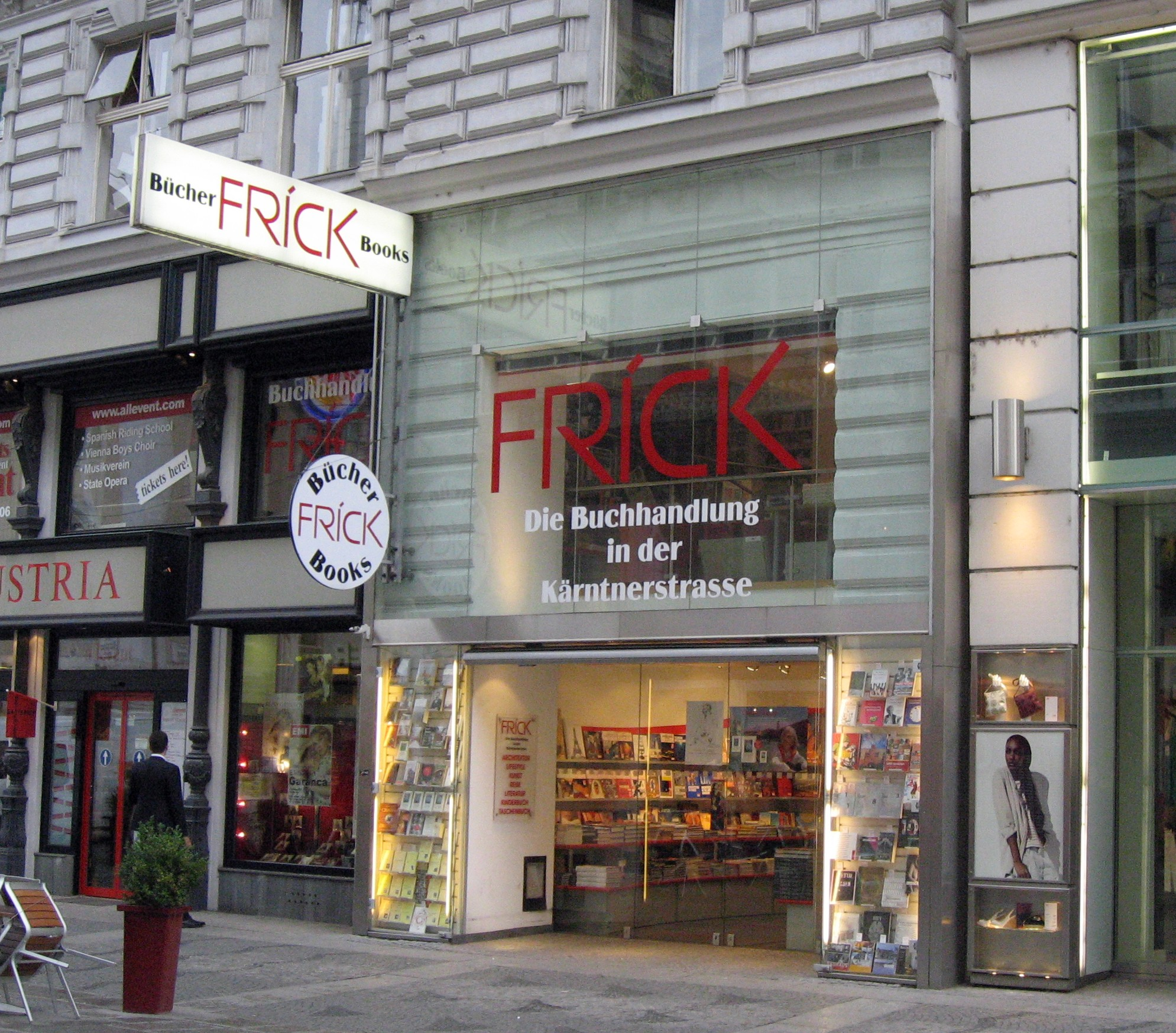 Buchhandlung Frick, Kärntner Straße, Wien